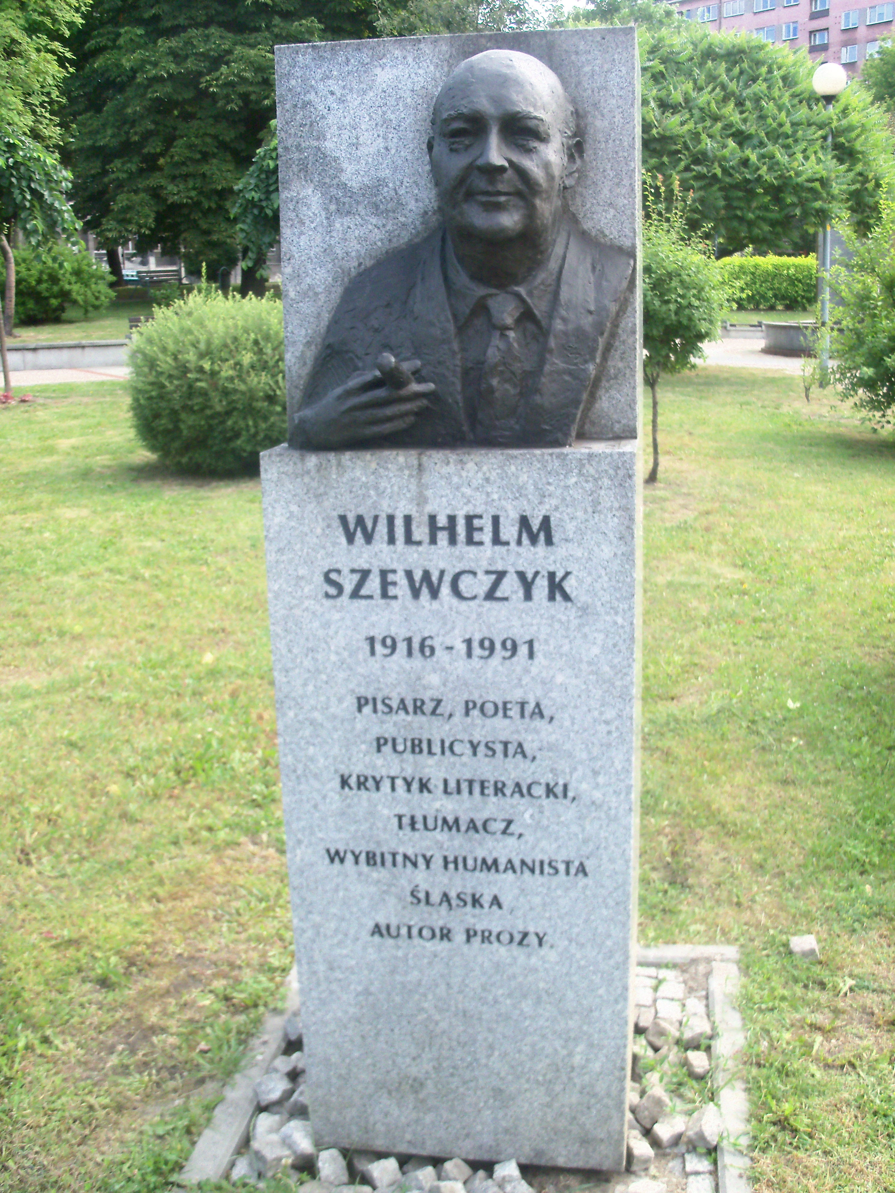 Galeria Artystyczna na placu Grunwaldzkim w Katowicach: Rzeźba przedstawiająca Wilhelma Szewczyka